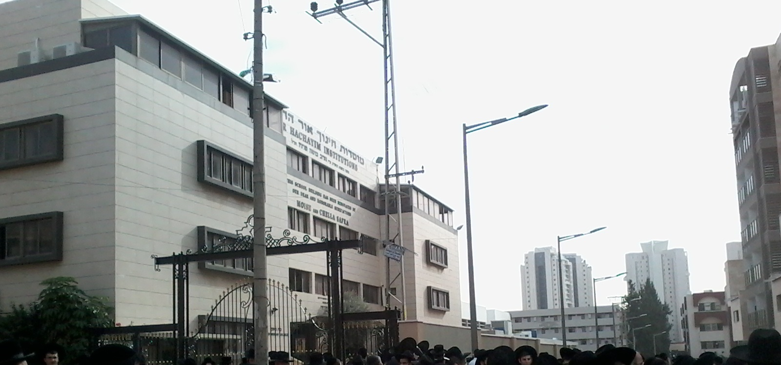 סמינר אור החיים (דצמבר 2017)